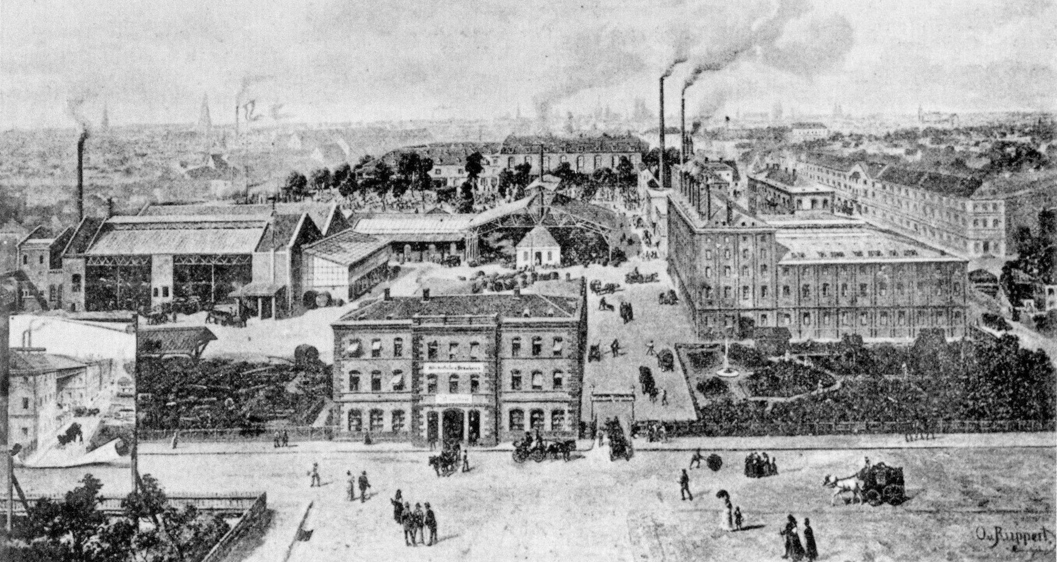 Buergerliches Braeuhaus, Munich, Germany